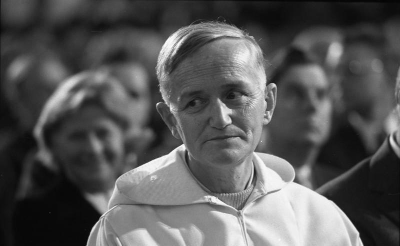 Der Friedenspreis des Börsenvereins des Deutschen Buchhandels wird an den Gründer und Prior der ökumenischen Bruderschaft von Taize, Roger Schütz, durch den Vorsteher des Börsenvereins Dr. Ernst Klett in Anwesenheit von Bundespräsident Walter Scheel in der Pauls-Kirche überreicht.